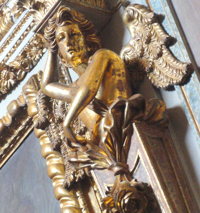 Catedral do Pilar - atlante na capela-mor